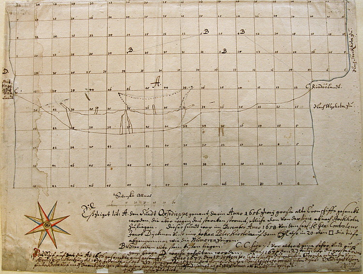 Johan Peter Kirstenius karta över Oxdjupet. Kartan finns i original på Krigsarkivet. Översättning och tolkning av den tyska texten: A. Ett sund som kallas för Oxdjupet där år 1656 tvenne stora gamla örlogsfartyg sänktes, vilka dock genom den starka strömmen lade sig i linje mot Stockholm. Detta sund blev i december år 1658 sjömätt av före detta herr generalkontrollören Jacob Dickman och av mig, Johan Peter Kirstenius – varifrån numren på kartan kommer. B. Här skall det ligga gamla stenkistor. C. Här finns sedan gammalt ett grund och på berget vid D finns en vakt. År 1675, den 23 juli, sänktes här på samma ställe som de år 1656 sänkta fartygen, Stora Kronan varvid hon blev punkterad i skrovet. Den 15 september år 1677 har jag i en krönika om Gustav Vasa av Ægidius Girs, tryckt i Stockholm 1670, på sidan 213 läst att år 1549 blev Oxdjupet utanför Stockholm igensänkt av stenkistor varvid en ny bom lades över Stegesund. Samtidigt byggdes det ett blockhus på Vaxholm.